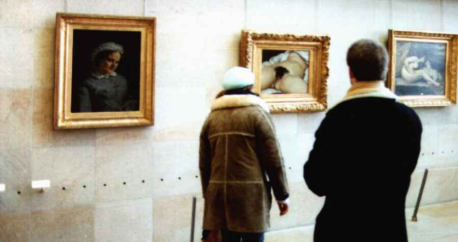 L’Origine du monde (1866), gustave courbet, taken by myself in paris, musée d’orsay, 3.2005